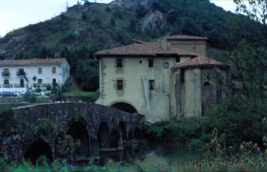 Basilika Trinidad de Arre / Navarra